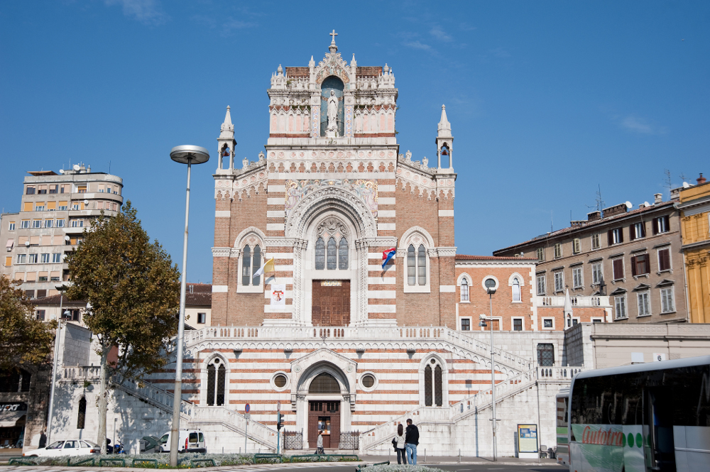 Kapucinska crkva Gospe Lurdske u Rijeci tijekom proslave 400. godina Kapucina u Rijeci i Hrvatskoj.